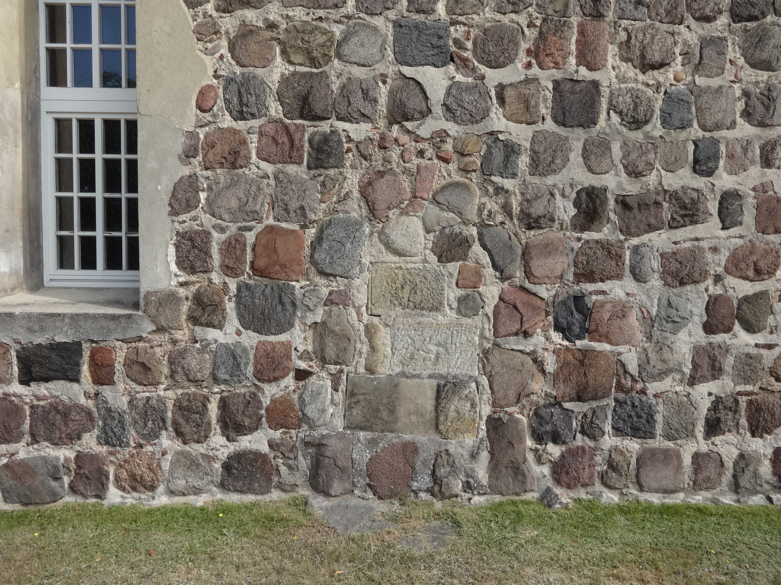 Die Feldsteinkirche in Glasow (Blankenfelde-Mahlow, Brandenburg) entstand in der zweiten Hälfte des 13. Jahrhunderts und wurde barock überformt. Im Innern befindet sich eine schlichte, bauzeitliche Ausstattung sowie eine Schnitzfigur aus der ersten Hälfte des 18. Jahrhunderts, die Johannes den Täufer darstellt.